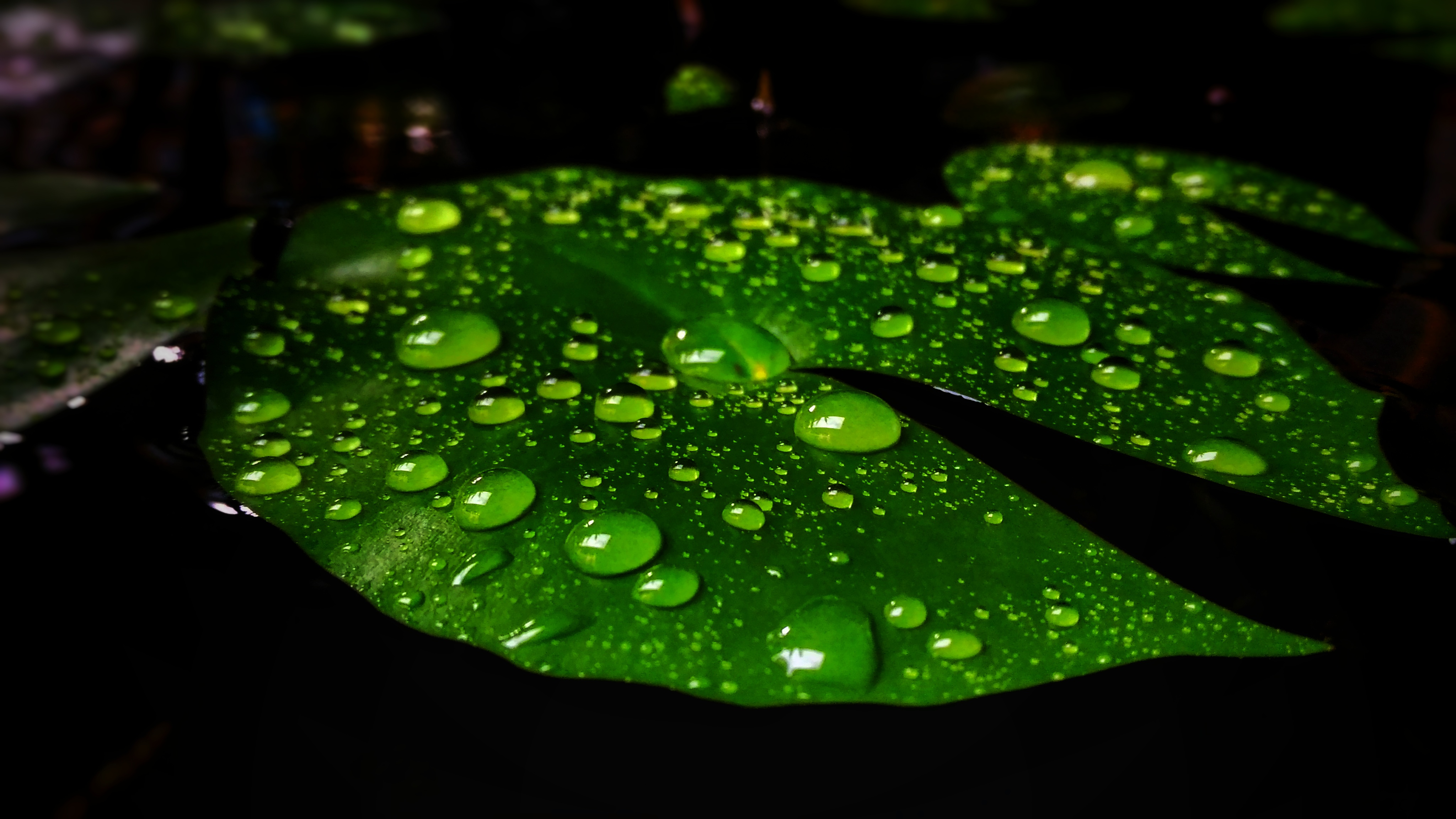 Embun diatas daun teratai